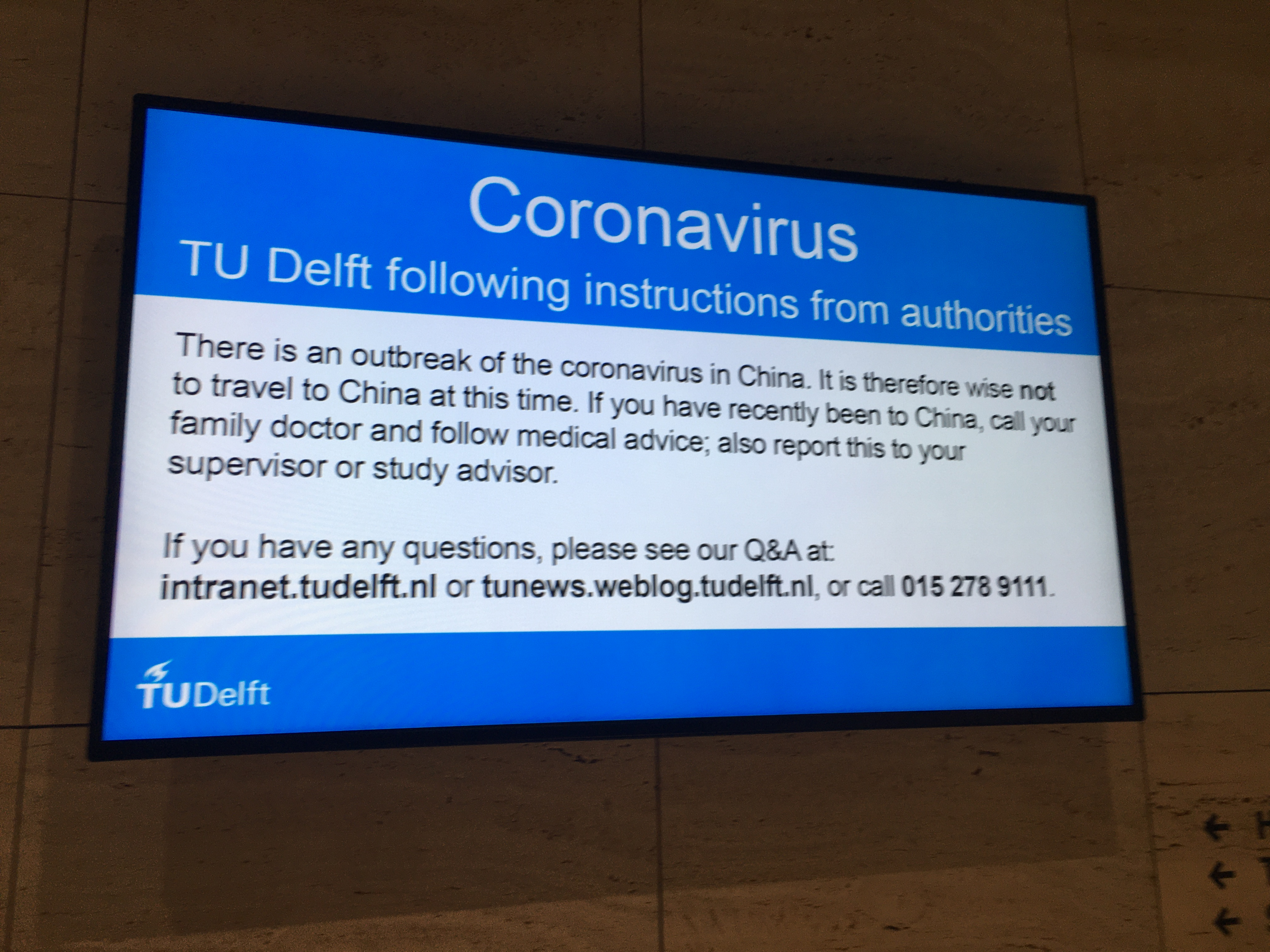 Televisiescherm in het gebouw Pulse van de Technische Universiteit met informatie om niet naar China te reizen